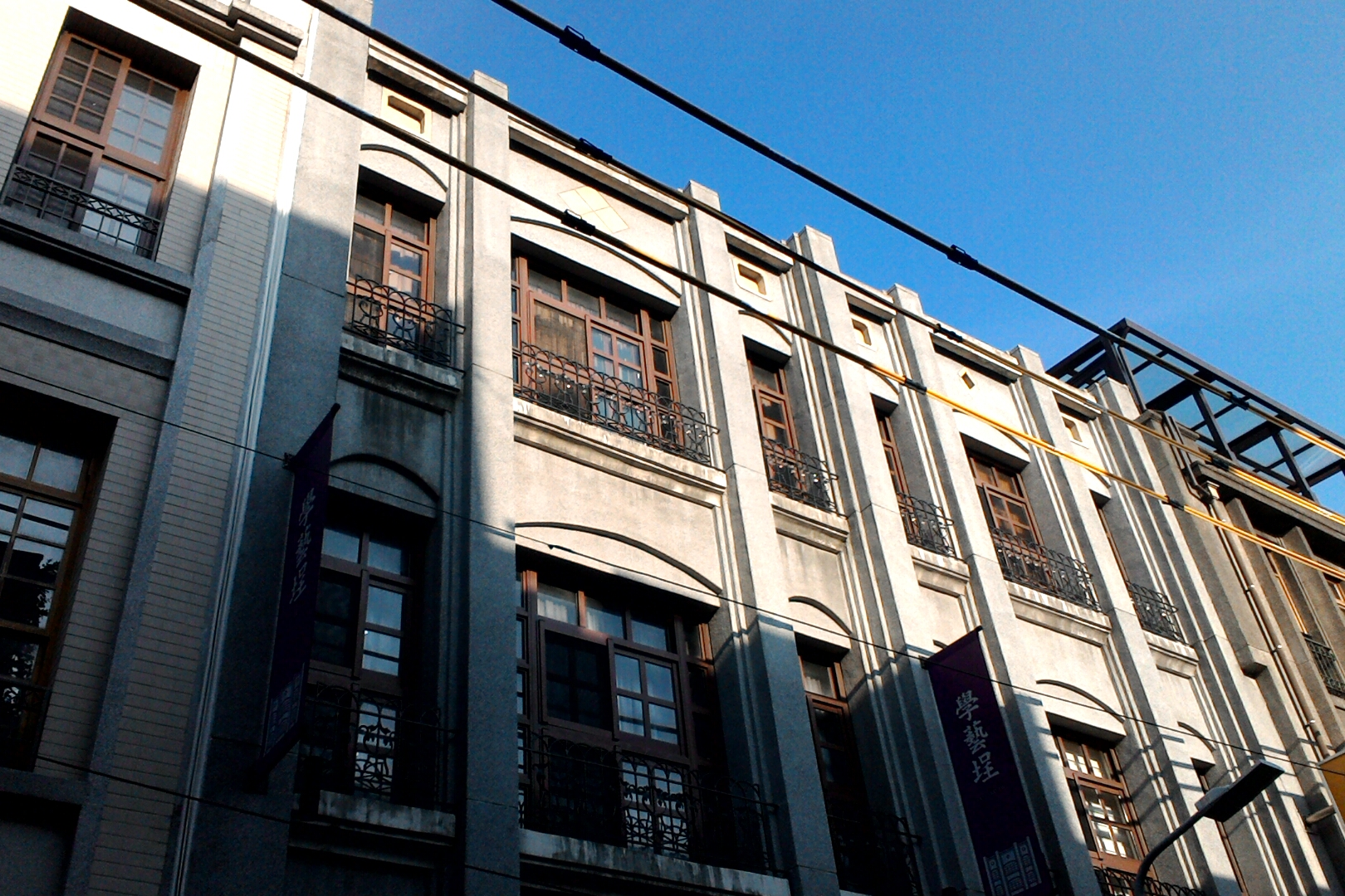 劉恆裕行與瑞盛行,台北市大同區延平次分區大有里